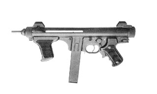 Beretta M12, Esercito Italiano